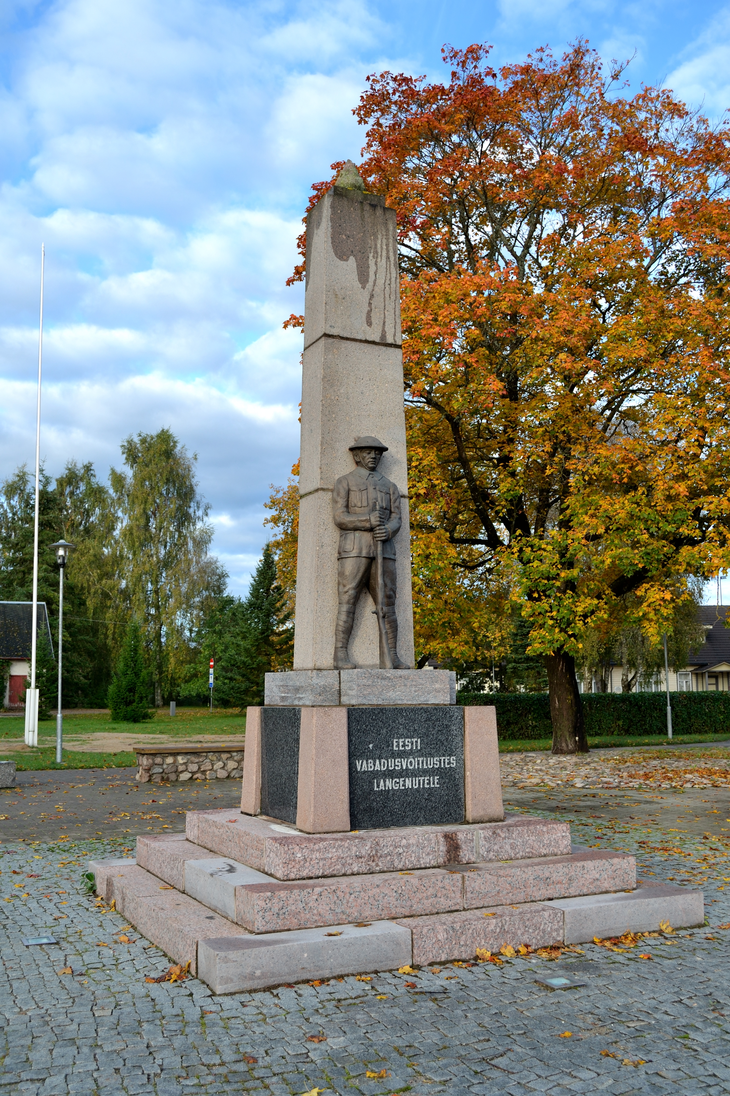 Vabadussõja mälestussammas, Kohila